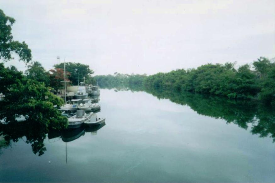 El Río Hondo desde el Puente Internacional entre Subteniente López (México) y Belice.